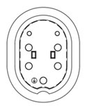 Presa tipo 3c